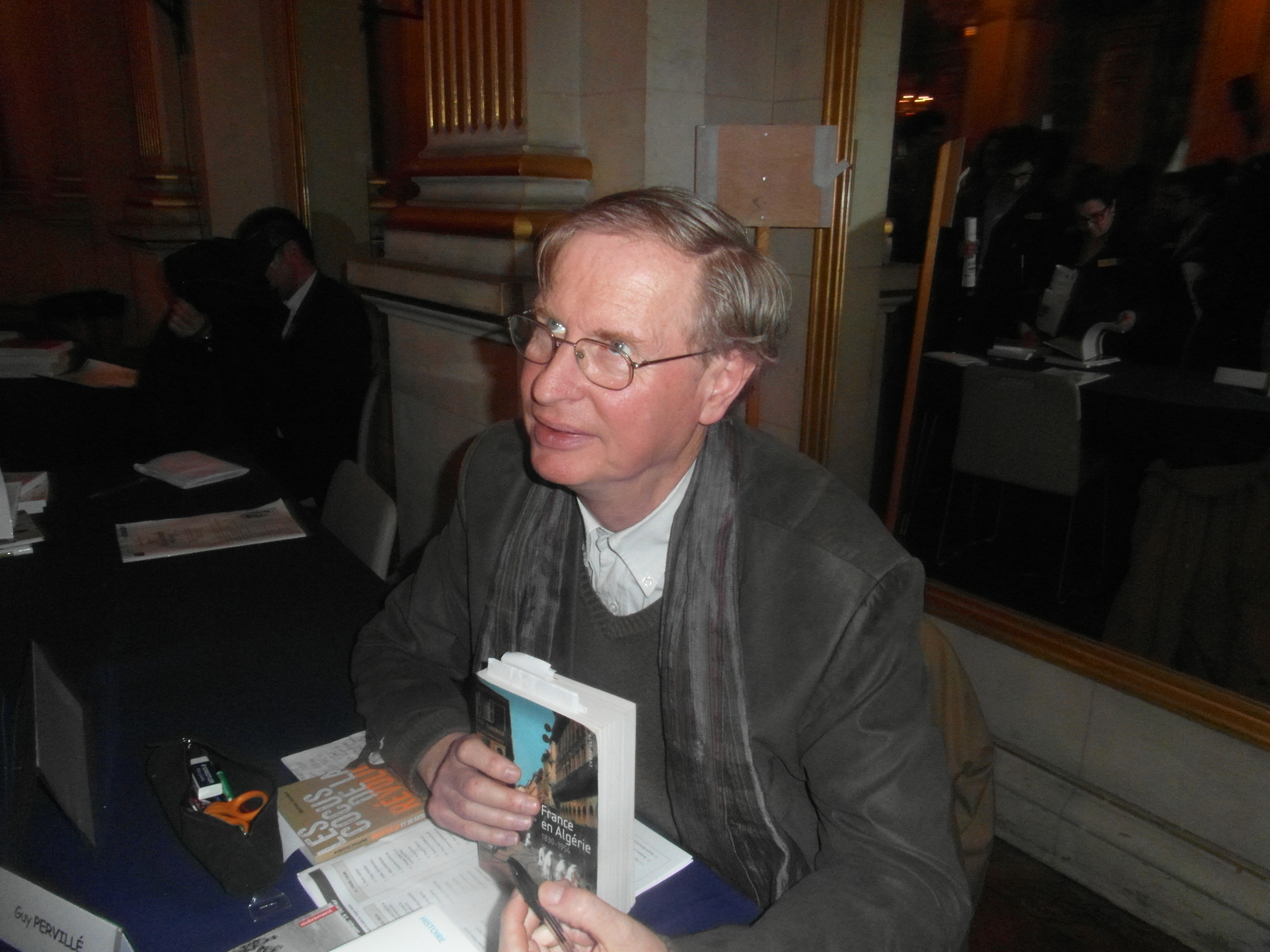 Guy Pevillé (19e Maghreb des Livres, Paris, 16 fév. 2013)